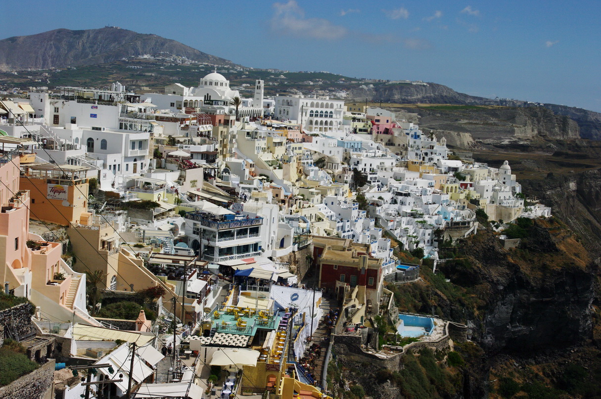 Fira gesehen vom Kraterrand bei Firostefani